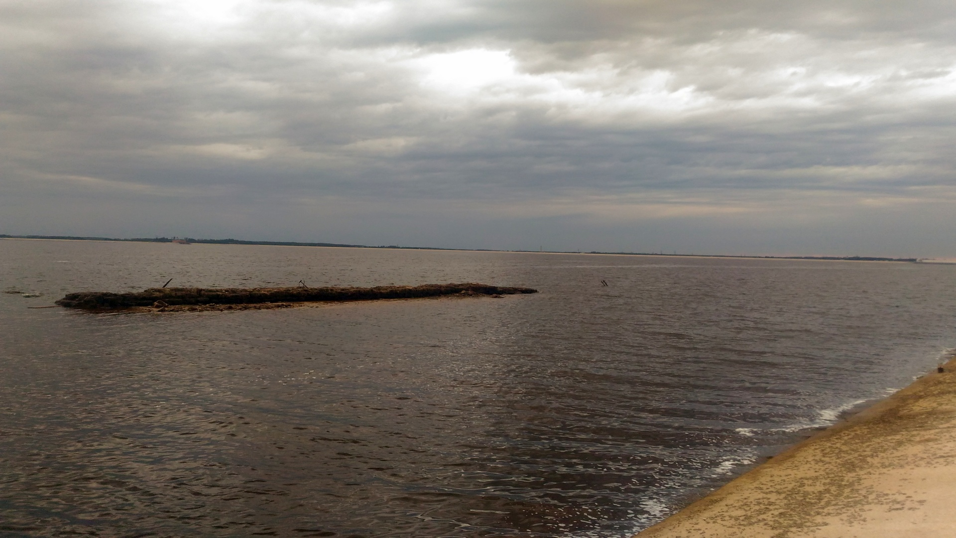 Periodos, kad ir pazemināts ūdens līmenis Rīgas HES ūdenskrātuvē zem minimālā atļautā ekspluatācijas līmeņa ir apskatāma interesanta vēstures liecība - Daugavā pie pludmales virs ūdens kļūst daļēji redzamas Salaspils viduslaiku pils drupas.